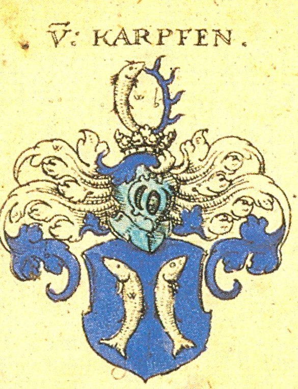 Ritterschaft und Adel aus Schwaben von Karpfen